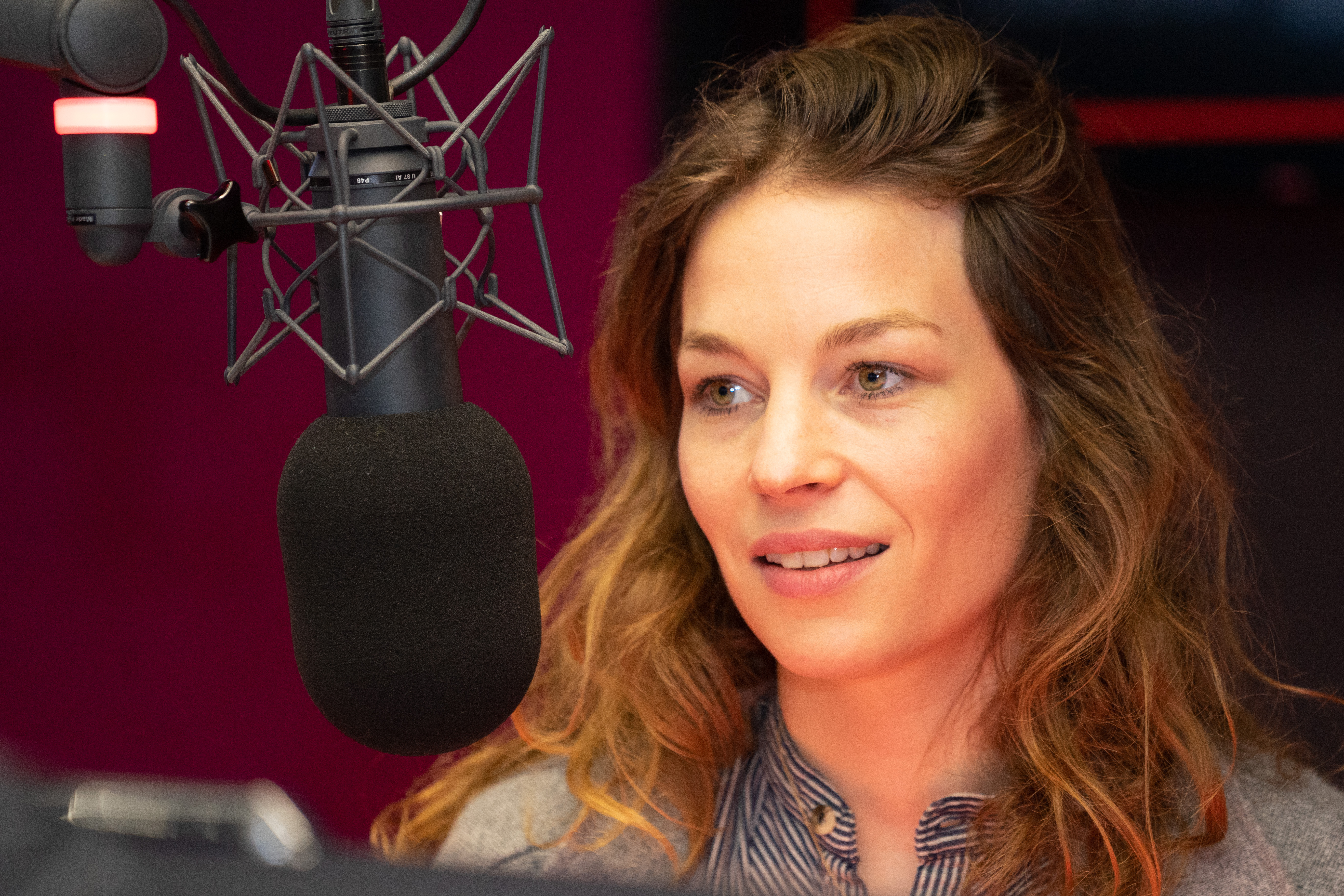 Anna Rossinelli bei einem Interview im Radio Pilatus Studio im Januar 2019